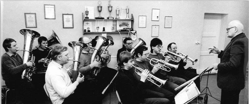 Kaarßen, Blasorchester der Gemeinde Zum Beitrag: Stradis Blasmusiker in Kaarßen - Begegnungen zwischen Elbedeich und Wanderdüne ADN-ZB Pätzold - 10.4.1989 - Temperamentvolle Blasmusik erklingt im Gerätehaus der Freiwilligen Feuerwehr in Kaarßen, einem kleinen Elbdorf im Kreis Hagenow. Seit genau 30 Jahren geben Laienmusiker jeden Mittwoch punkt 19.30 unüberhörbare musikalische "Zeitzeichen" im Dorf. Normalerweise ertönen Tuba und Posaune aus dem Saal der Klubgaststätte, doch an diesem Tag war dort eine Feierstunde. Bereits sechsmal errang das Ensemble den Titel "Hervorragendes Volkskunstkollektiv". Gekonnt leitet Antonius Stradivarius Schulz, ein 78jähriger ehemaliger Berufsmusiker, das Zusammenspiel der Instrumente. "Stradi", wie er liebevoll von den Musikanten genannt wird, hört jeden kleinen Fehler sofort (Hierzu gehören die Fotos 1989-0410-300N-303N!)